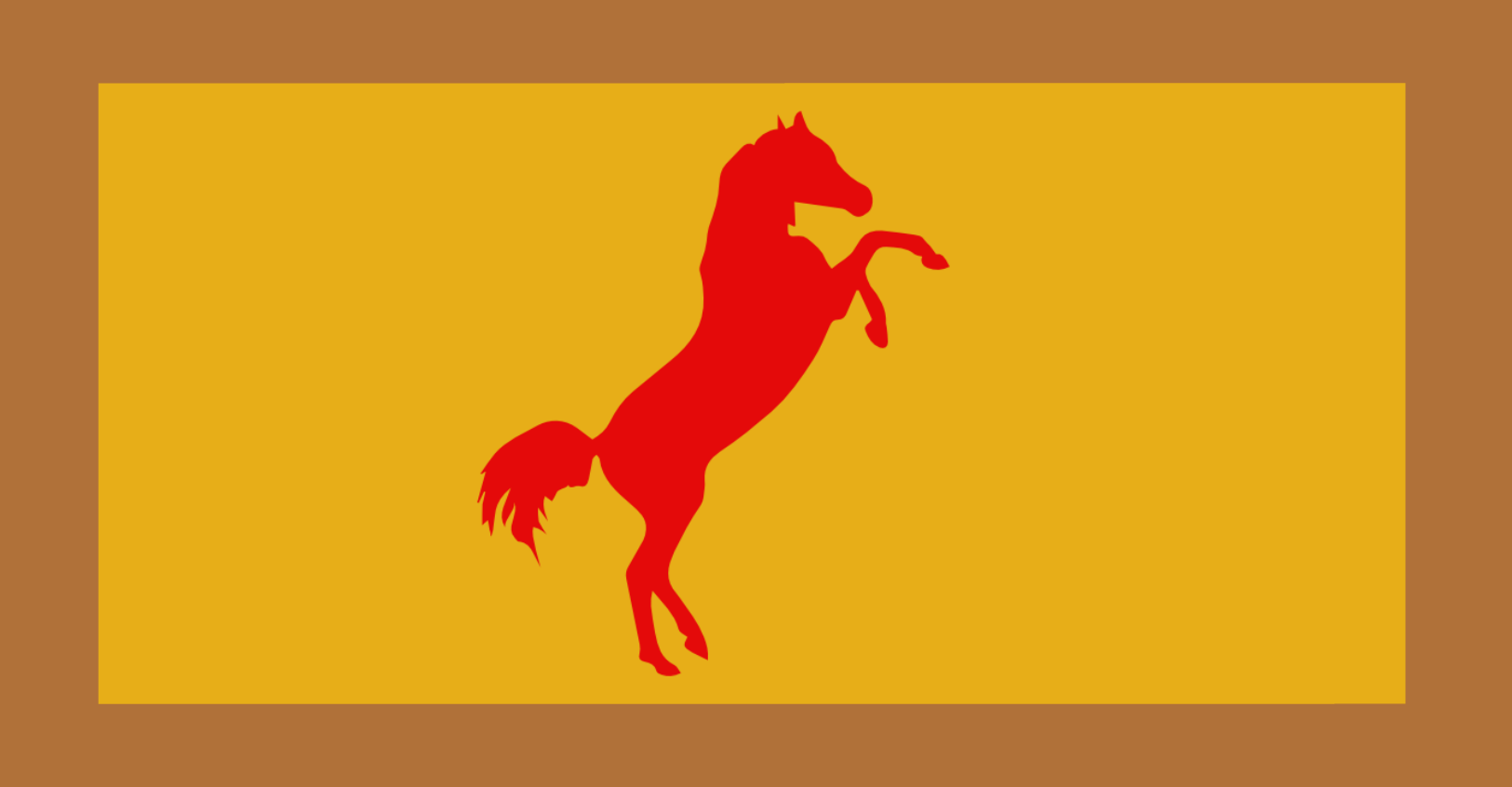 House Bracken-Game of Thrones Flag